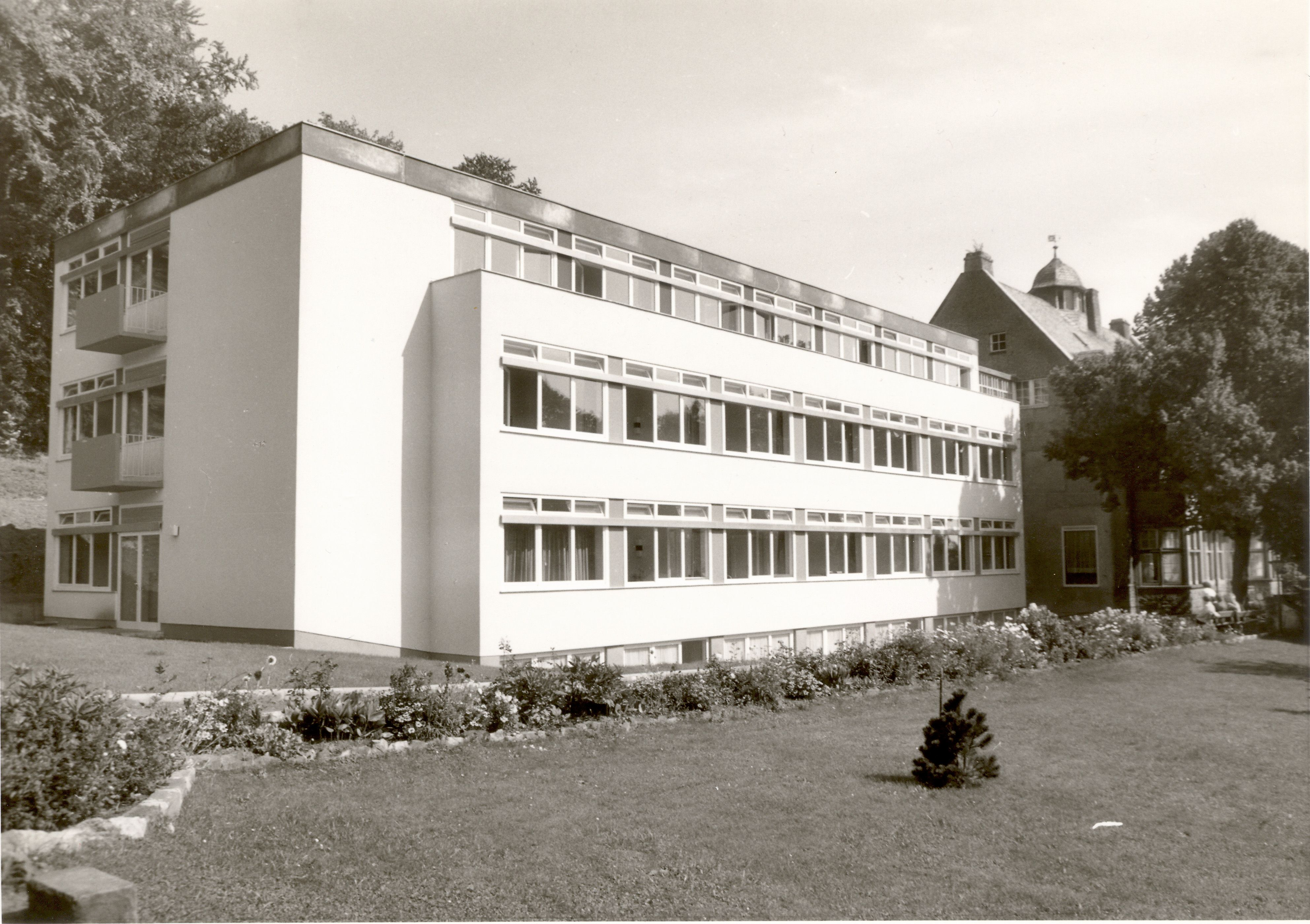 Der Erweiterungsbau der Königin-Elena-Klinik 1965/66